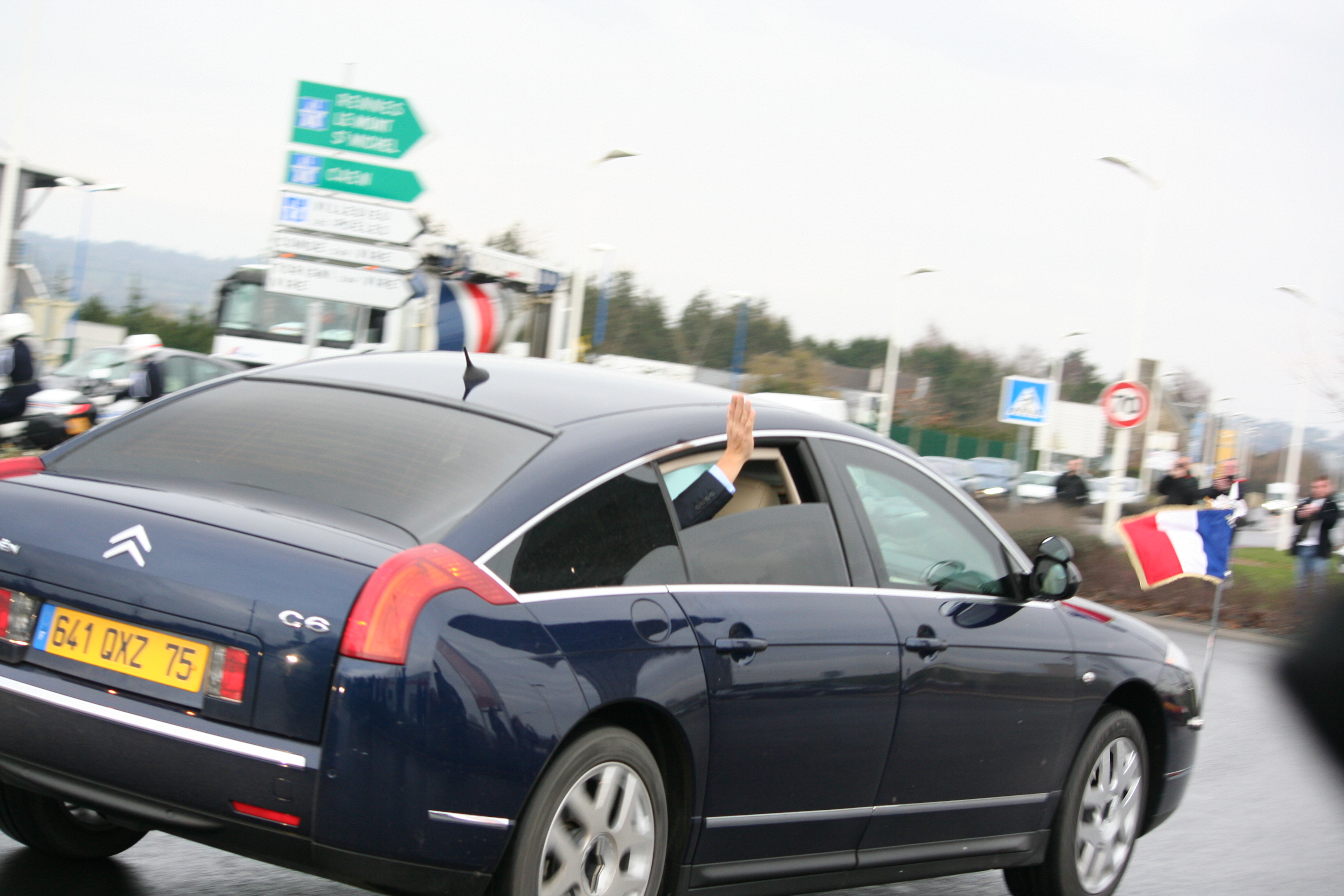 Visite de Nicolas Sarkozy à Saint-lô en janvier 2009